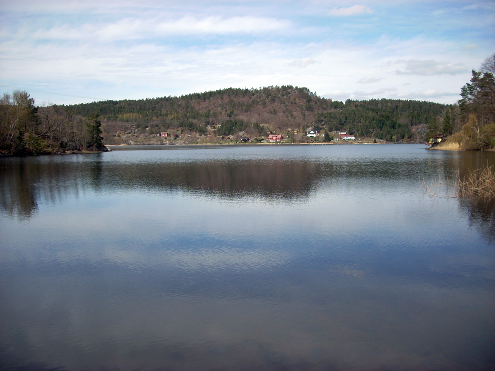 Longumvannet ved Frednes, Arendal